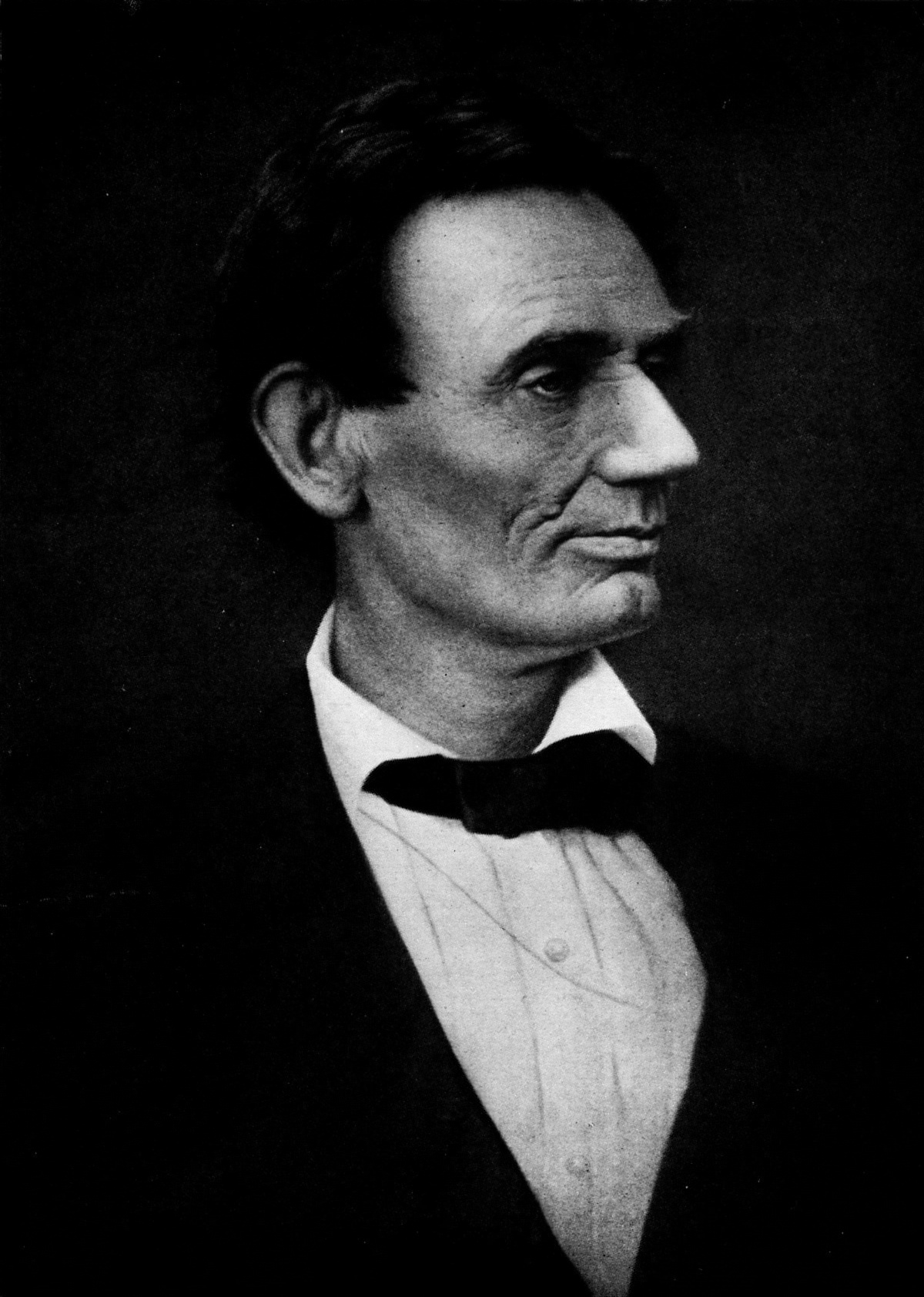 Abraham Lincoln Ostendorf# O-26; Meserve# M-26